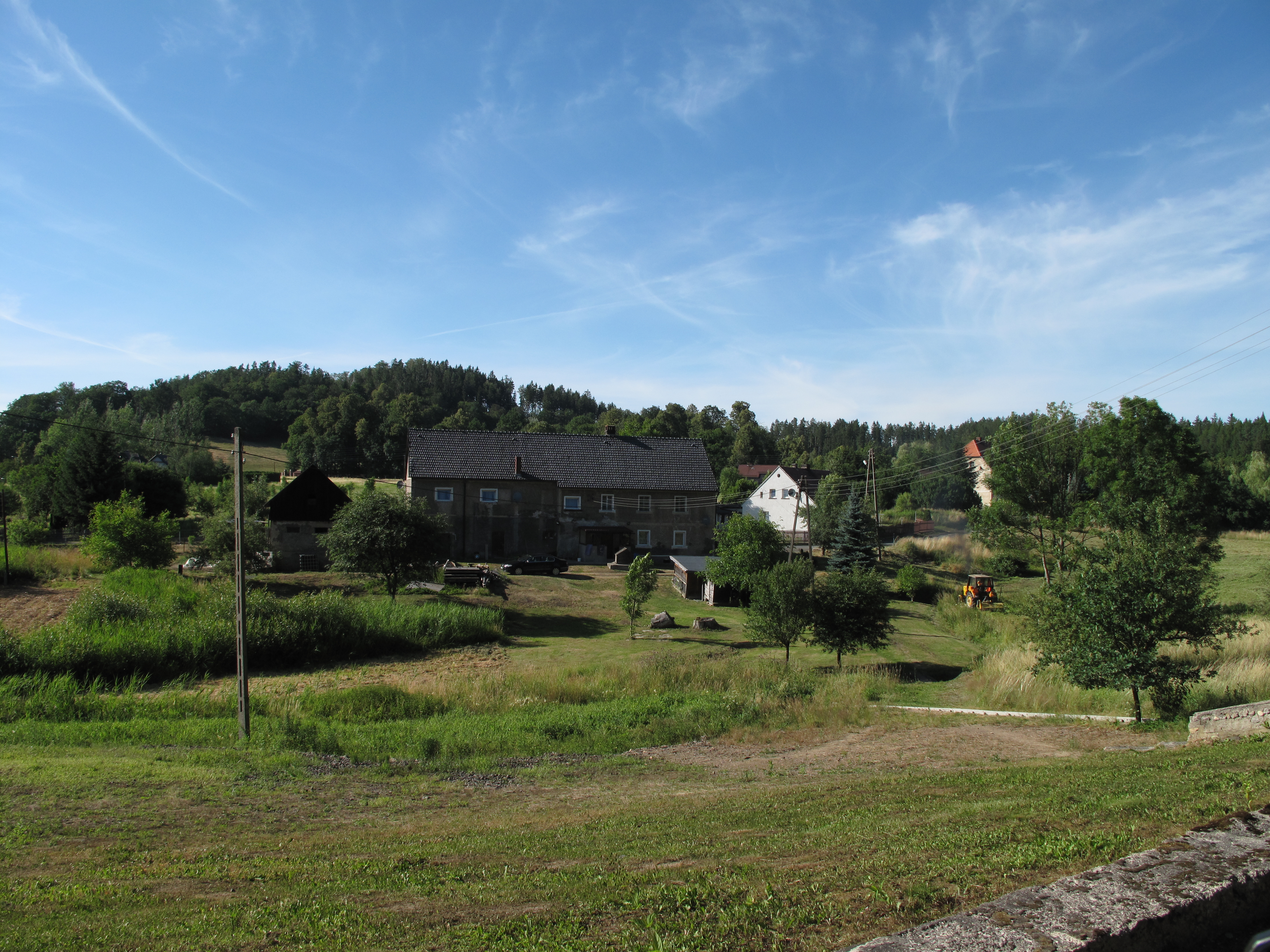 Dąbrowica (powiat jeleniogórski). Polska.